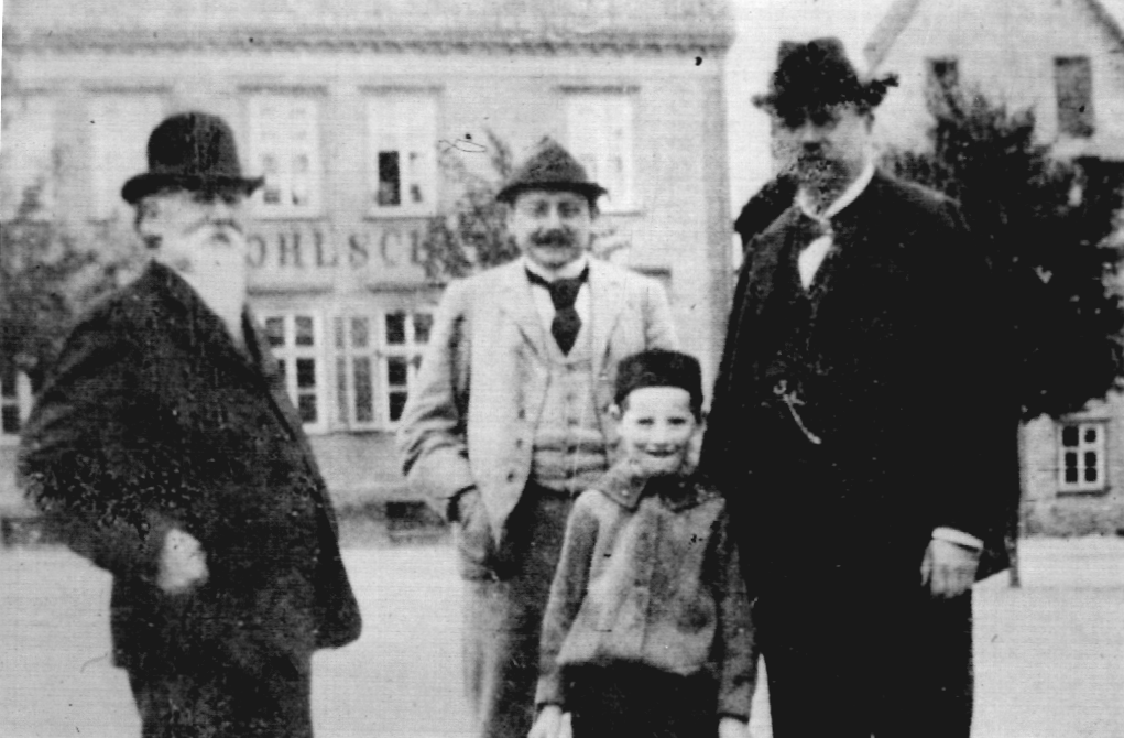 Nordseite des Neustadtmarktes in Warburg, bei den Personen handelt es sich wahrscheinlich um Mitglieder der Brauerfamilie Kohlschein